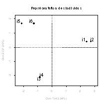 Figure1. AFDM